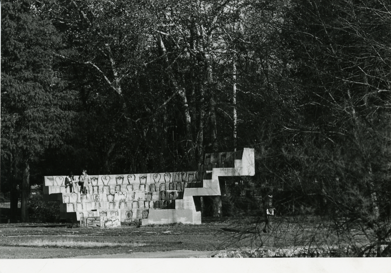 Arman, Accumulazione musicale, intervento scultoreo in cemento e ferro, 1971, Parco Sempione, Milano.[1] Servizio fotografico : Milano, 1981 / Paolo Monti. - Stampe: 5 : Positivo b/n, gelatina bromuro d'argento/ carta, 24x30. - ((Al verso delle stampe manoscritti i numeri dei negativi corrispondenti: 3765/36, 3768/1, 3768/5, 3768/13, 3768/17. Sul coperchio della scatola manoscritto a pennarelo: "Milano Monumenti". - Fonte: Quaderno di Paolo Monti: Monti - Nikon - Leica 3001 - (1978), presso Archivio Paolo Monti